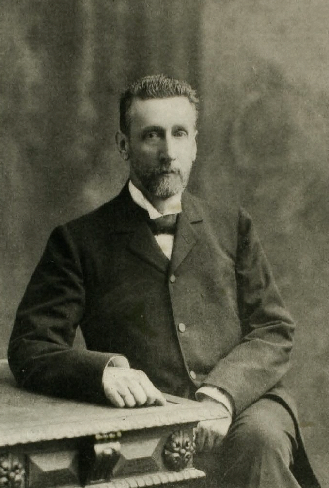 Fernando Liborio Lazcano Echaurren (Santiago el 23 de julio de 1848 - septiembre en 1919) fue un abogado y político chileno, de tendencias liberales.